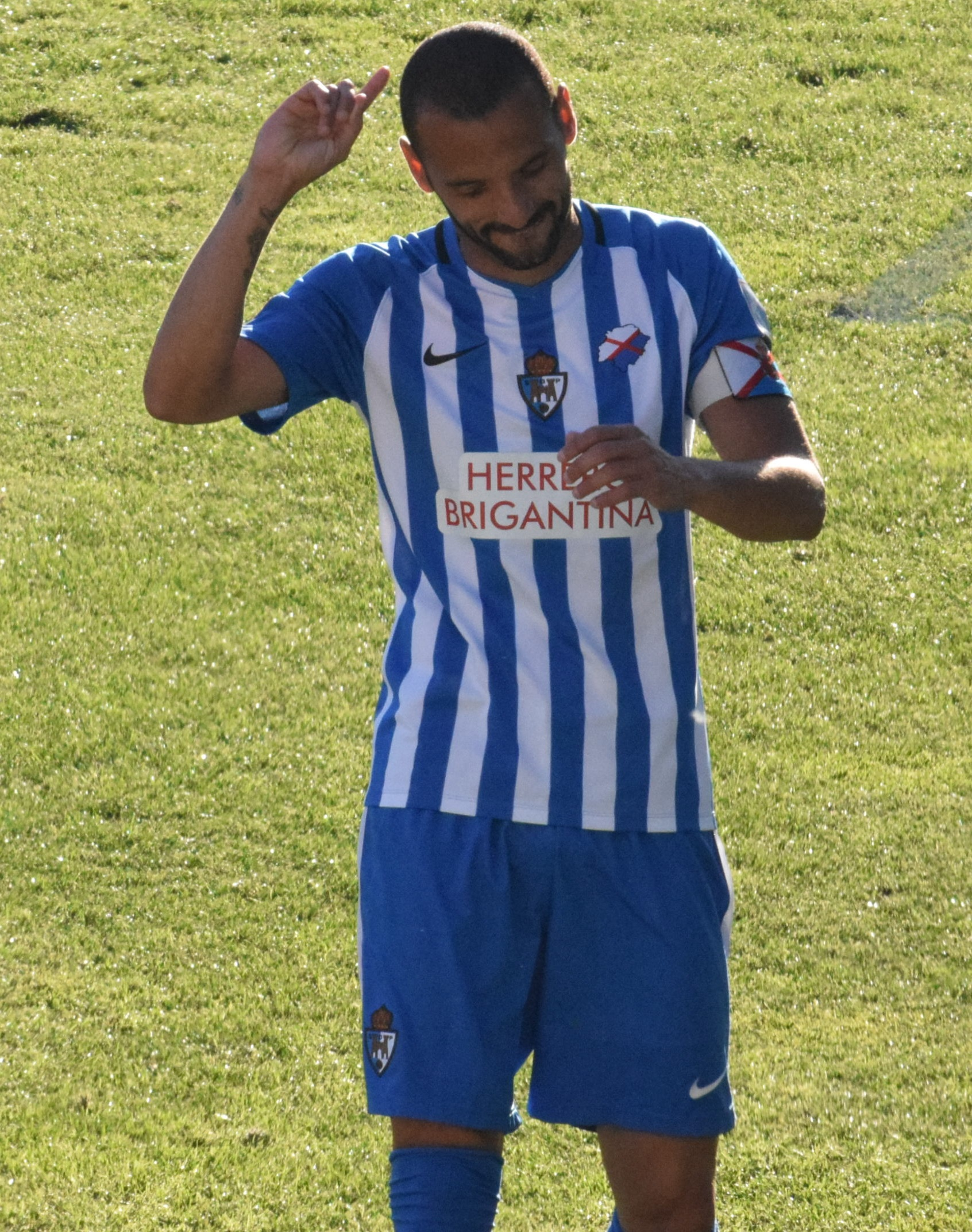 Yuri de Souza, el delantero brasileño, en un partido con la SD Ponferradina en la temporada 2018-2019.